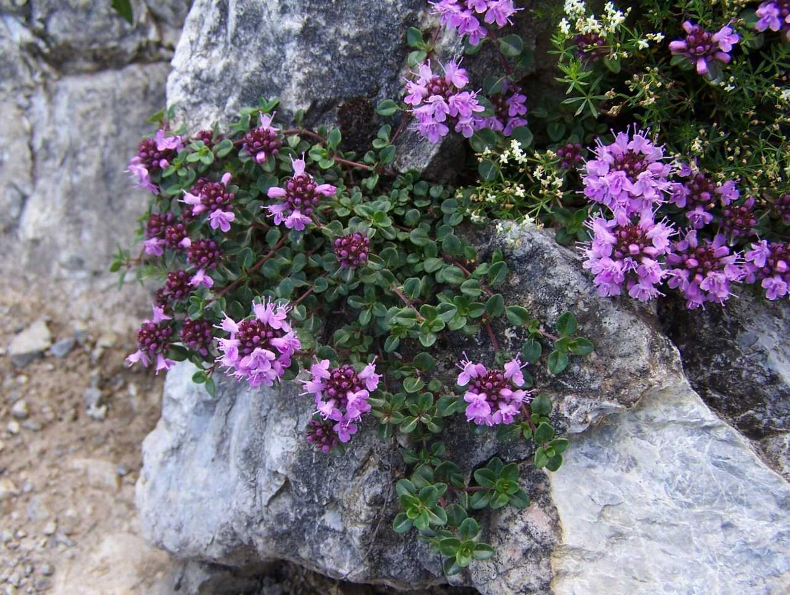 Thymus carpaticus (pl. macierzanka karpacka), habitat:Tatra Mountains, Przełęcz między Kopami